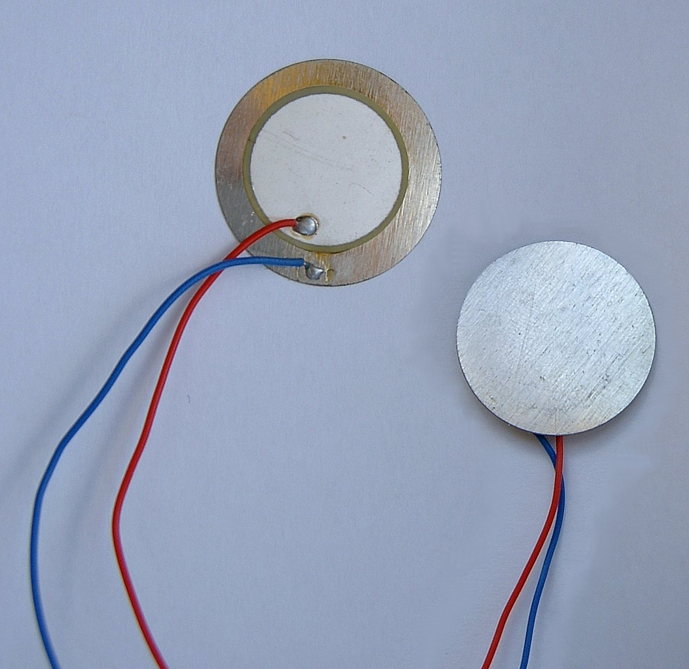 Ein kleines Piezo-Element ("Lautsprecher"), von vorn und hinten.